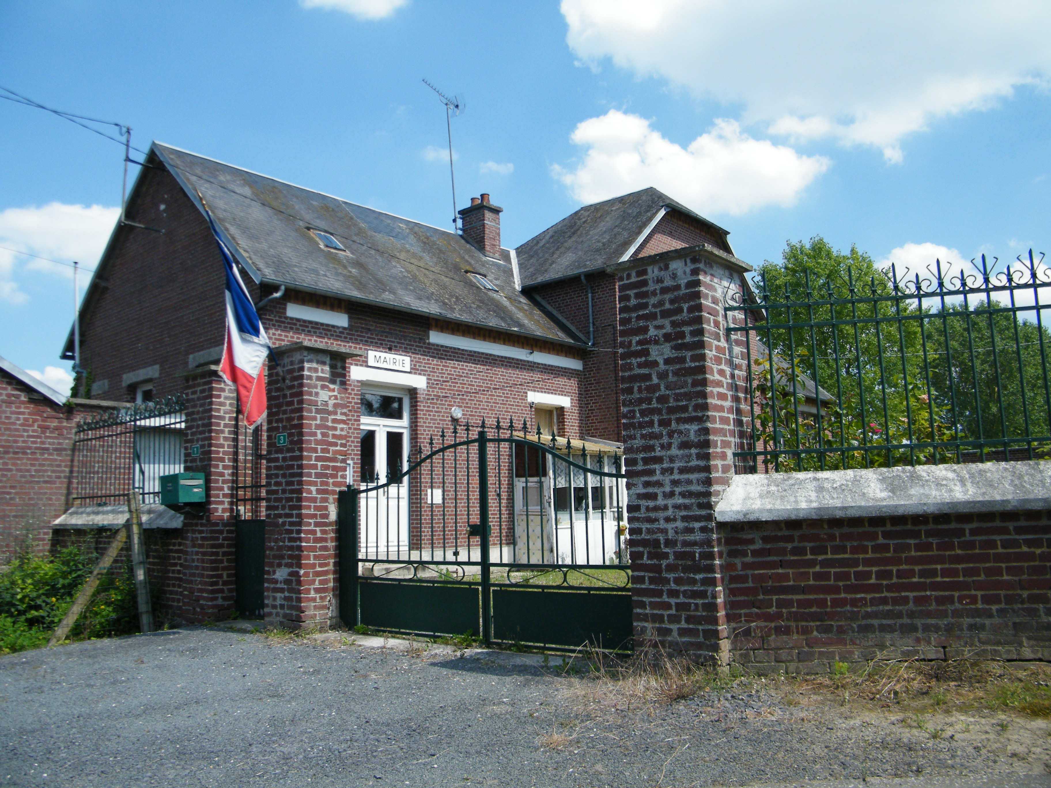 Mairie.